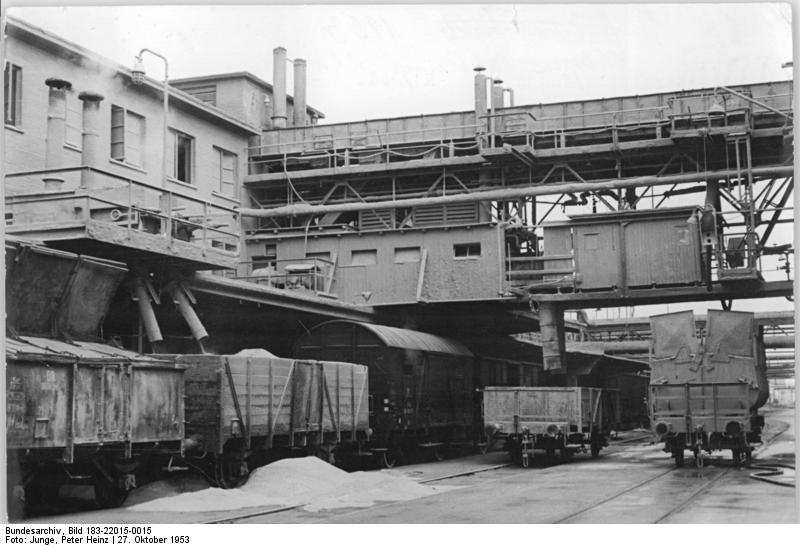 Zentralbild-27.10.1953-Junge-R.-Bed. Sag-Betrieb-Buna in Schkopau wird den Werktätigen unserer Republik übergeben. Bei den Verhandlungen der Deutschen Regierungsdelegatoin vom 20. und 22.8.1953 in Moskau,die im Sinne tiefer Freundschaft und in voller Gleichberechtigung der beiden Staaten verlief,kam die sowjetische Regierung zu dem Entschluß,die Chemischen Werke Buna in Schkopau, die zu den größten und wichtigsten Betrieben unserer Republik gehören. Wie die anderen 32 Sag-Betriebe, blieb 1.1.1954 kostenlos den Werktätigen unserer Republik zu übergeben. UBz: Ansicht im Buna-Werk.